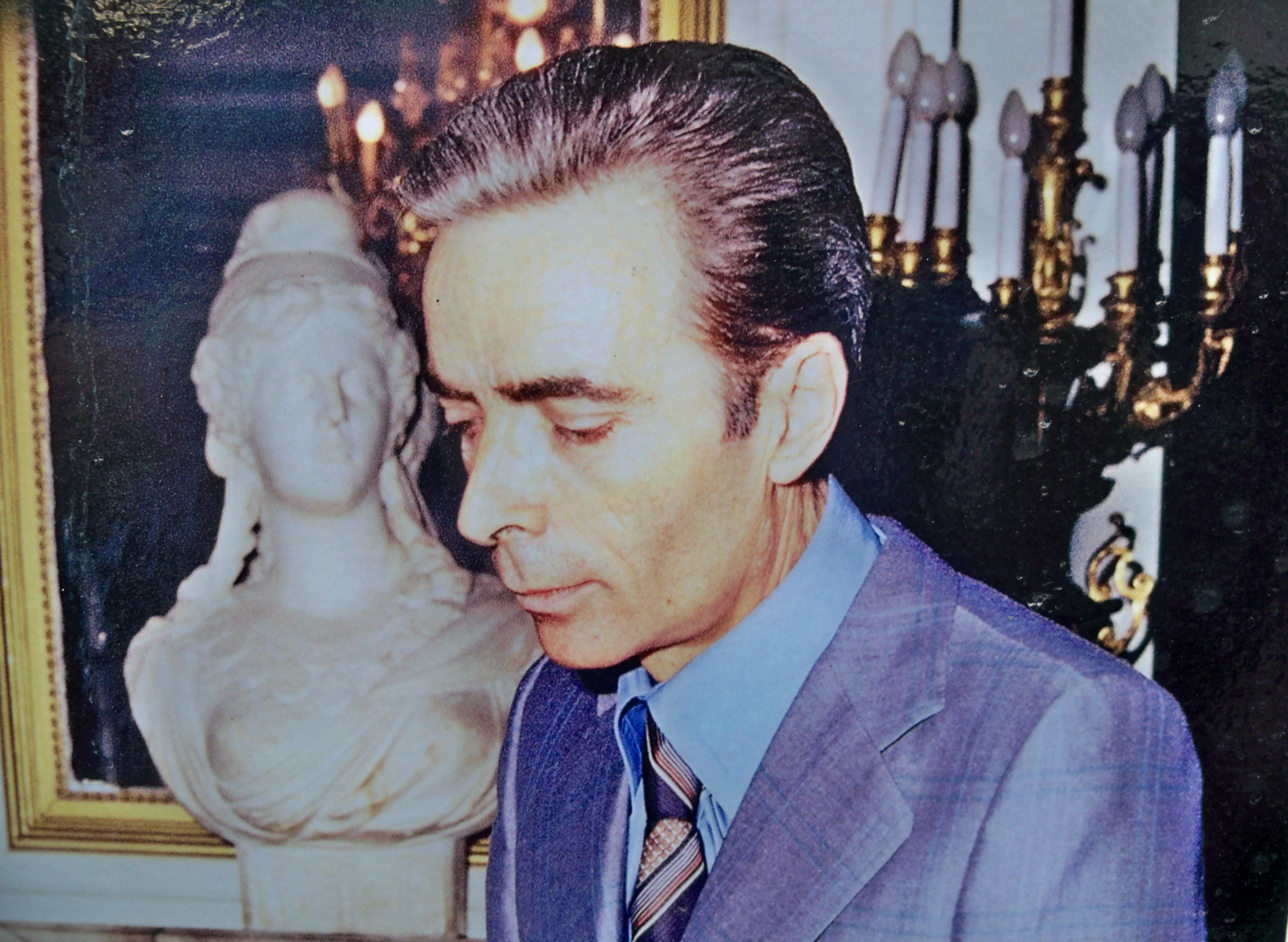 Maurice Charretier, ancien mairie de Carpentras